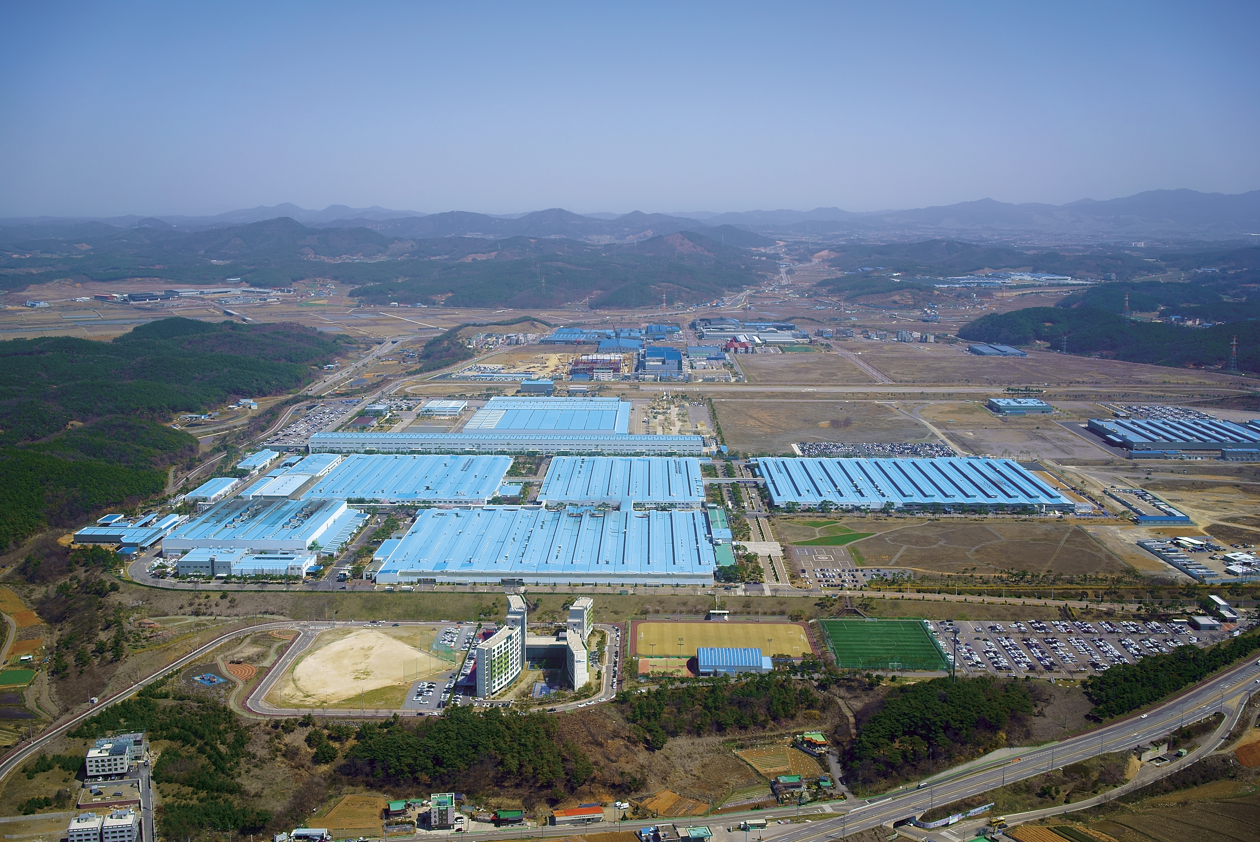 서산오토밸리 전경/2017. 4. 12. 촬영